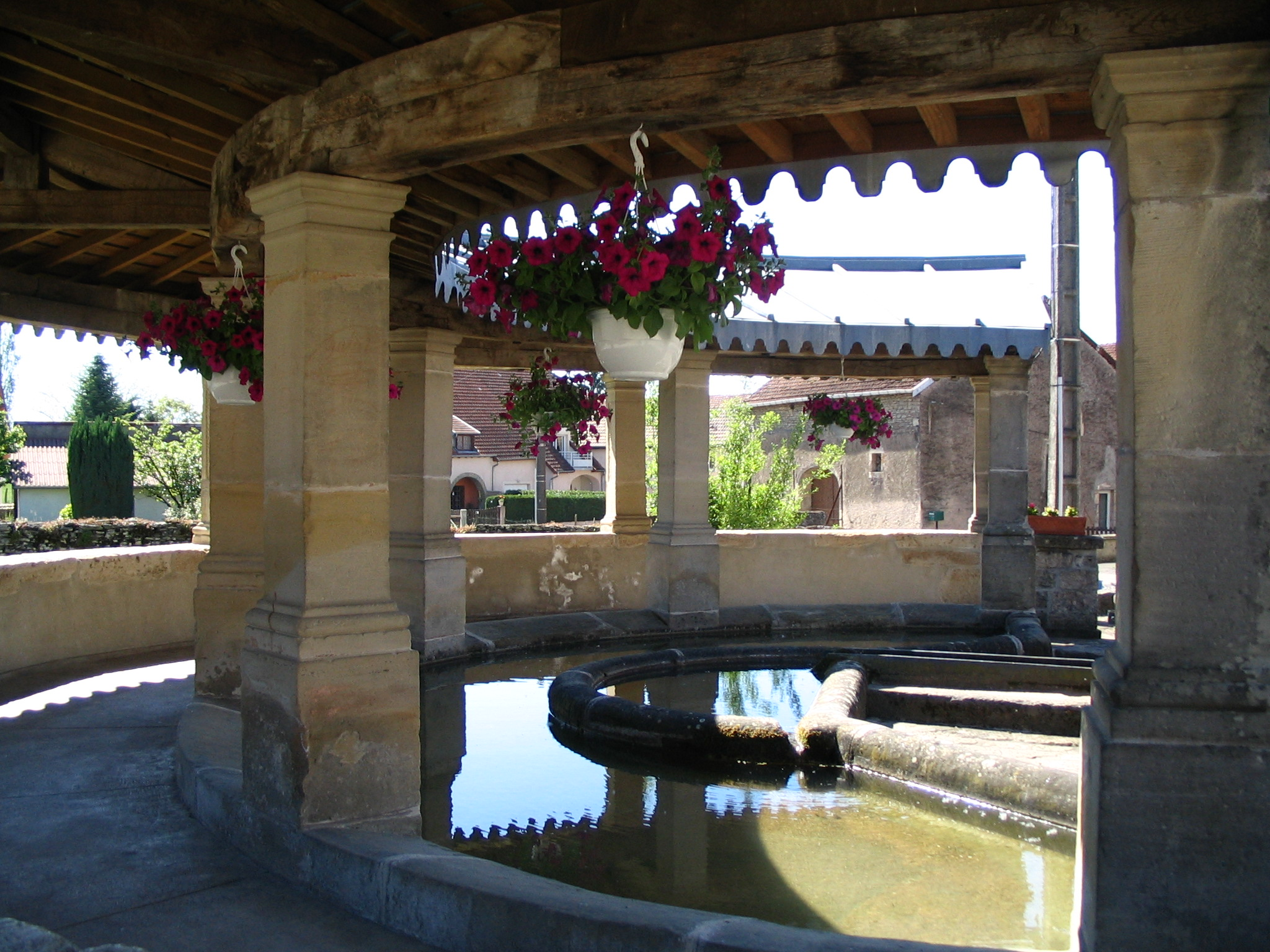 Fontaine Saint Martin à Ferrières-lès-Scey (Haute-Saône)